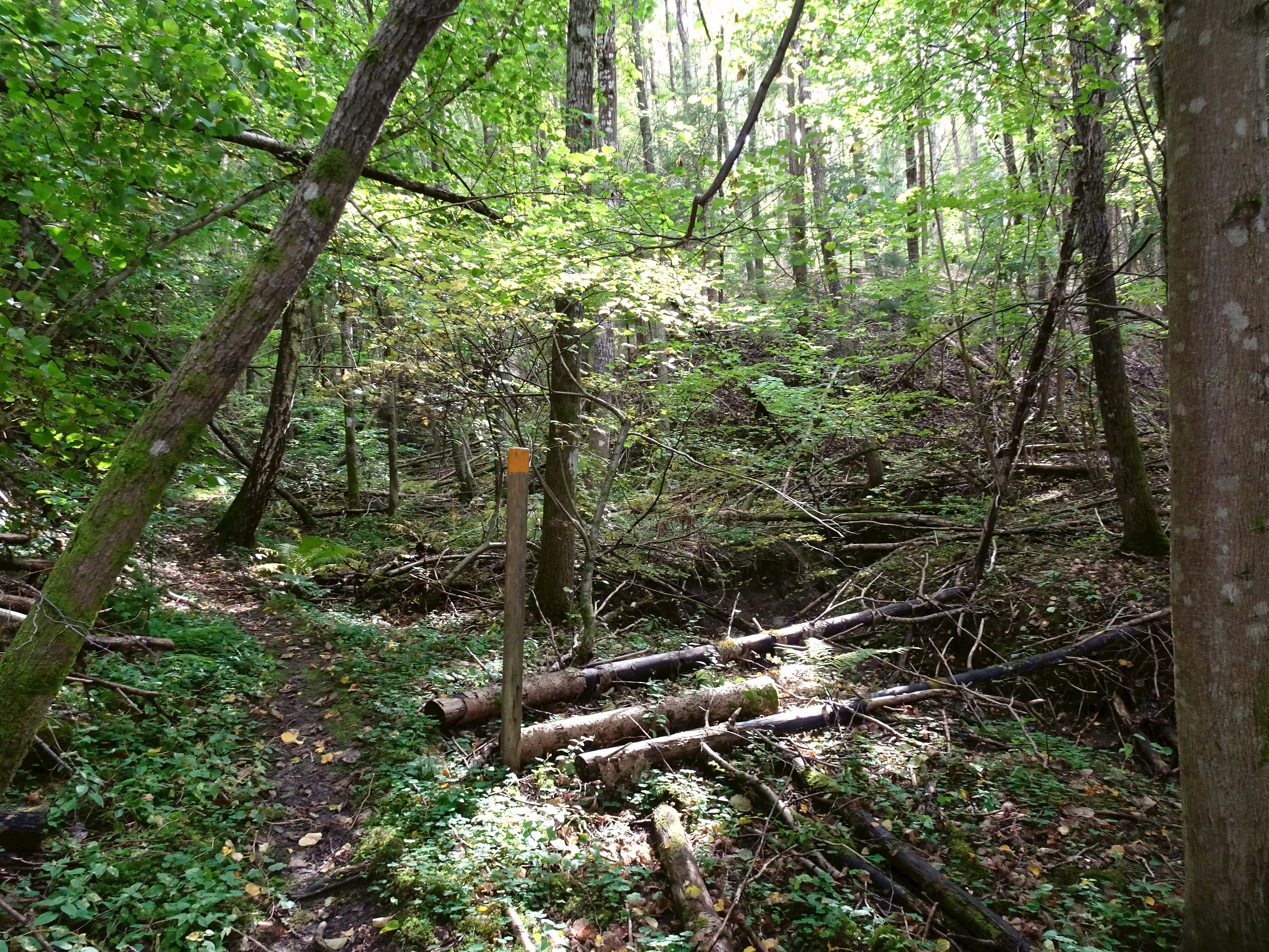 Naturreservatet Nytorpsravinen